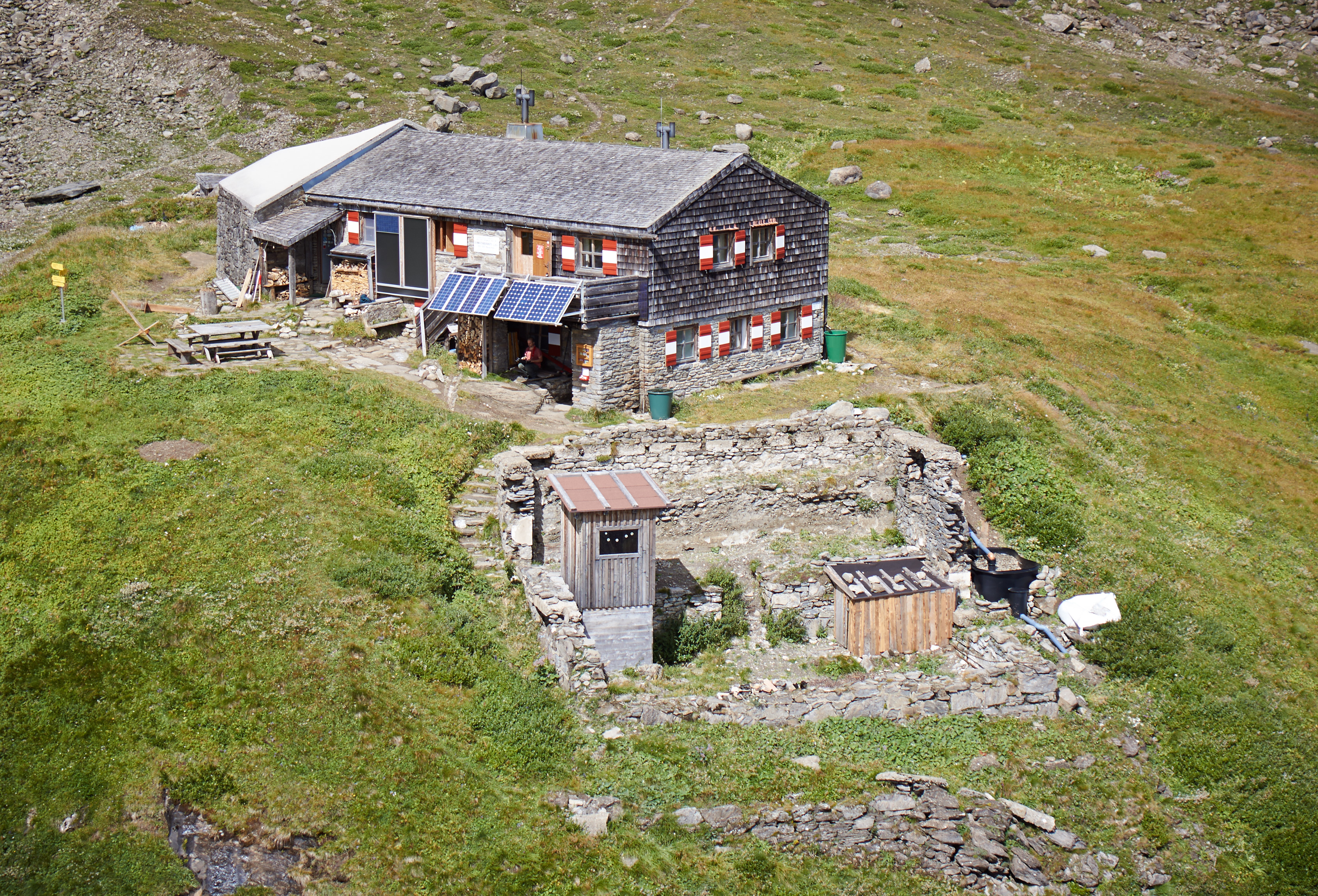 Schwarzenberghuette